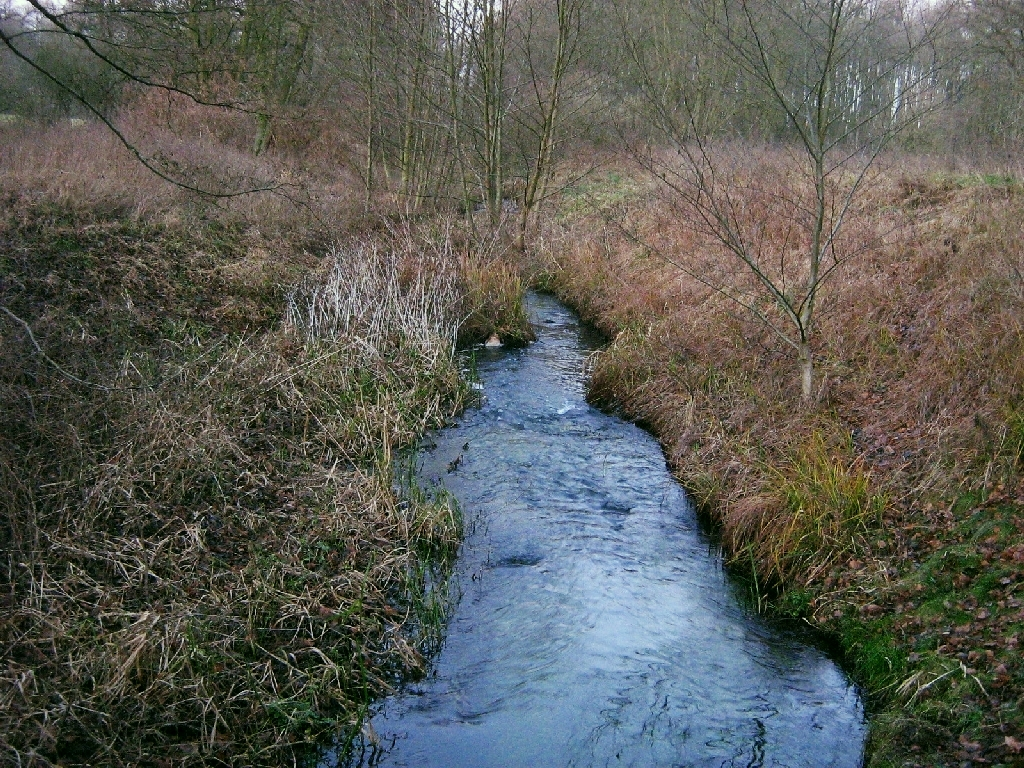 Der Ziemenbach zwischen Hohenzieritz und Prillwitz (Landkreis Mecklenburg-Strelitz). 53°26′59.55″N 13°7′49.29″E / 53.449875°N 13.1303583°E